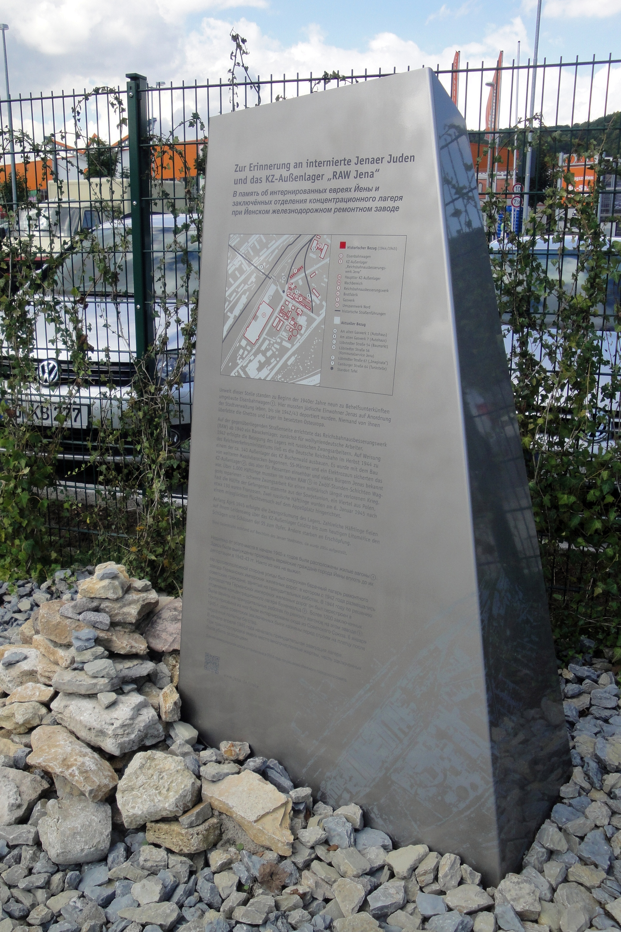 Stele zur Erinnerung an das Außenlager "RAW Jena" (Reichsbahnausbesserungswerk) des KZ Buchenwald an der Löbstedter Straße in Jena